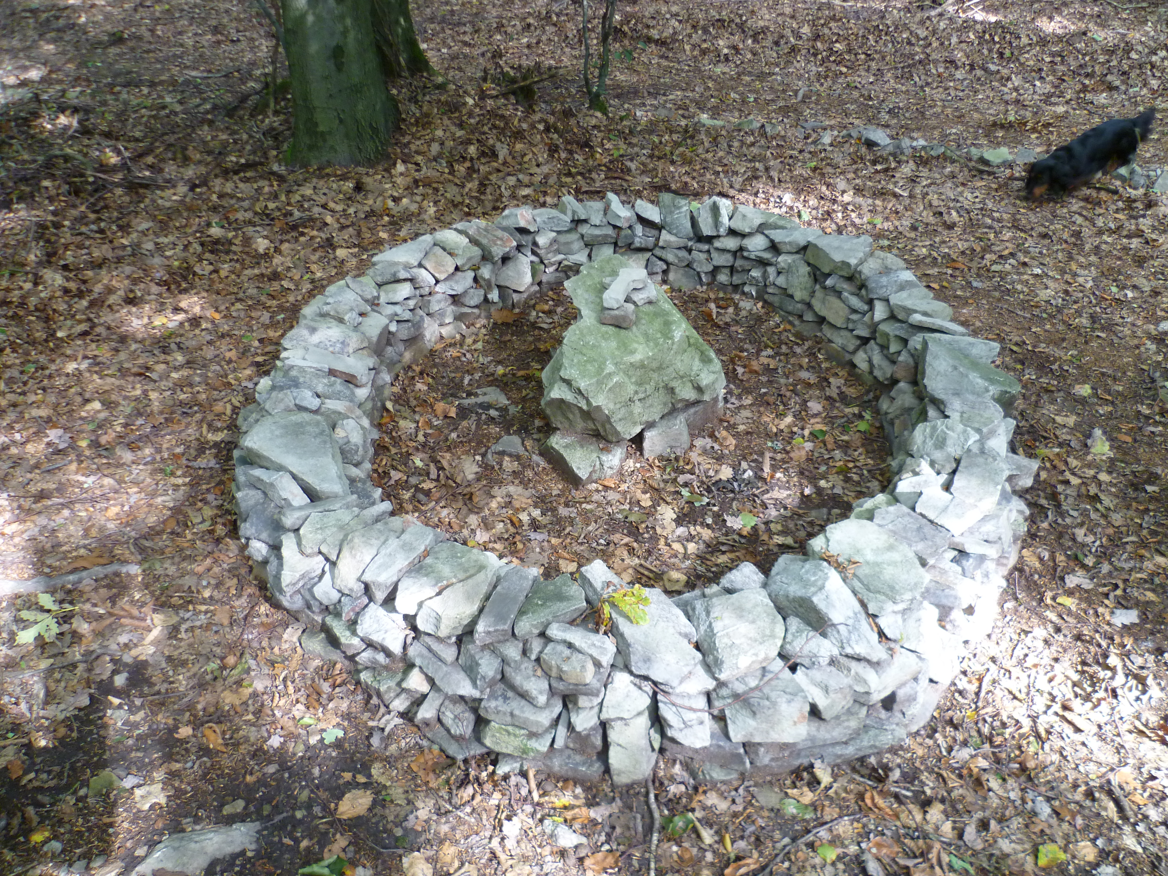 Eine der Verzierungen am Ringwall Gickelsburg